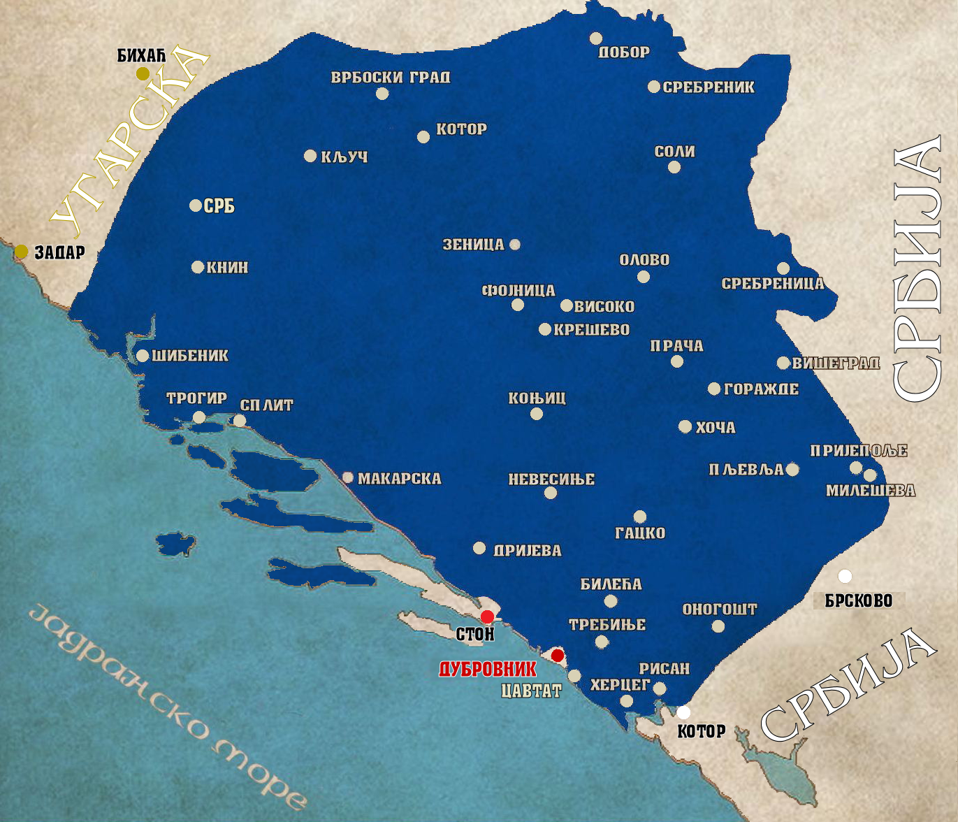 Босния в 1390 году